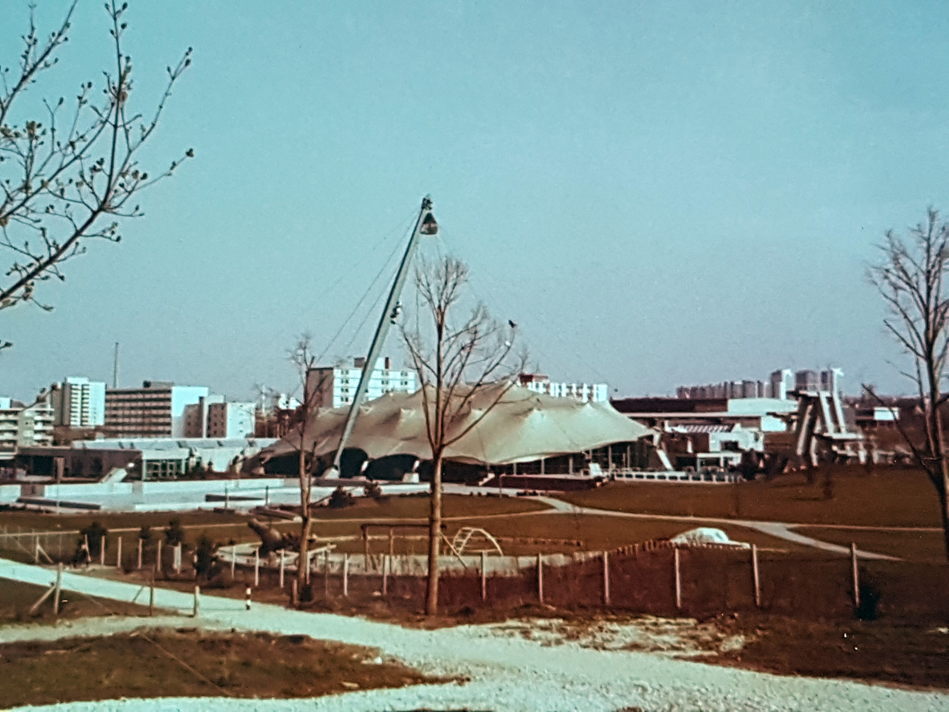 Das Westbad in Regensburg im Bauzustand nach der Eröffnung im Jahr 1972. Das Zeltdach konnte geöffnet werden und wurde damit wahlweise zum Freibad.